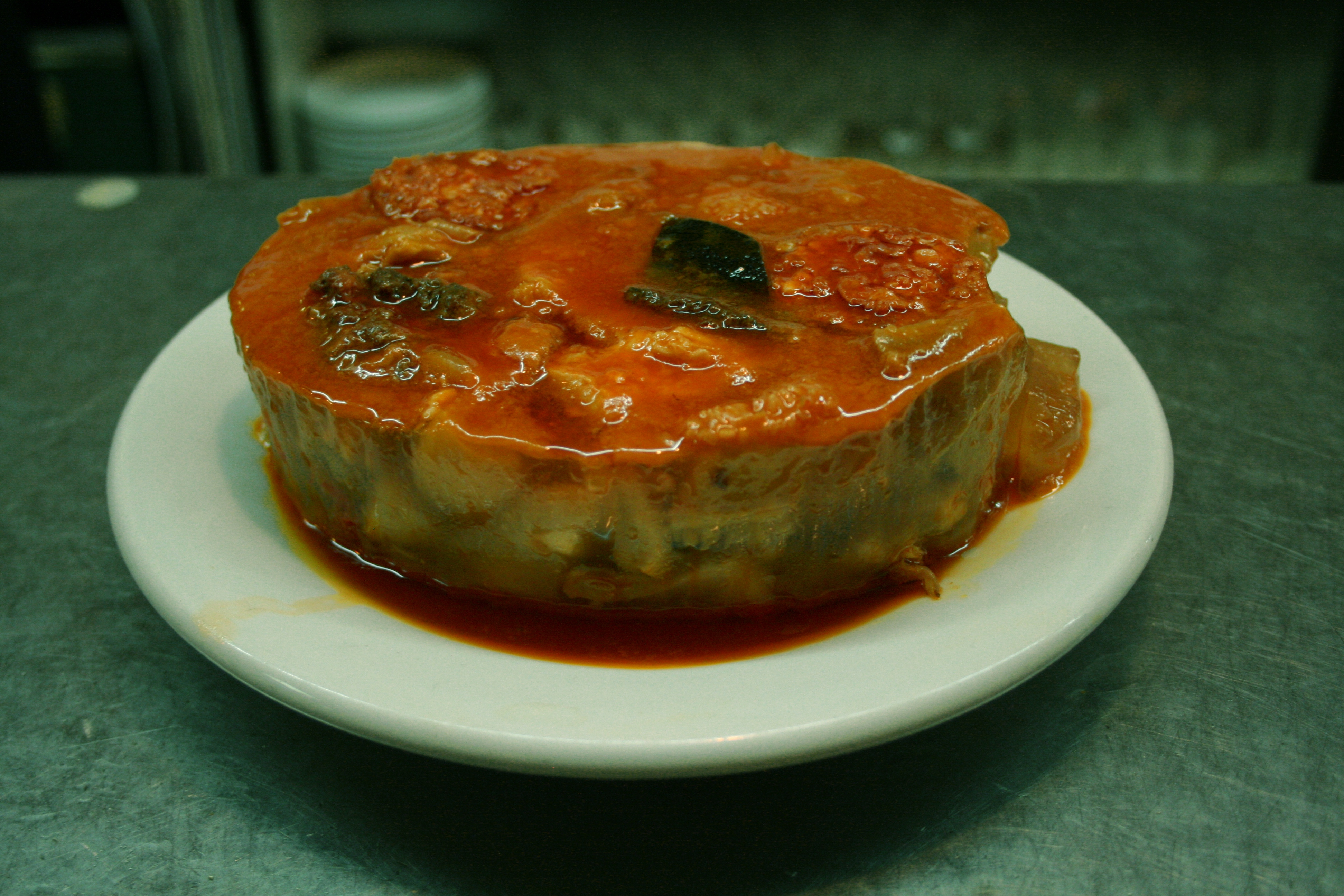 Callos a la madrileña - Presentación gelatinosa